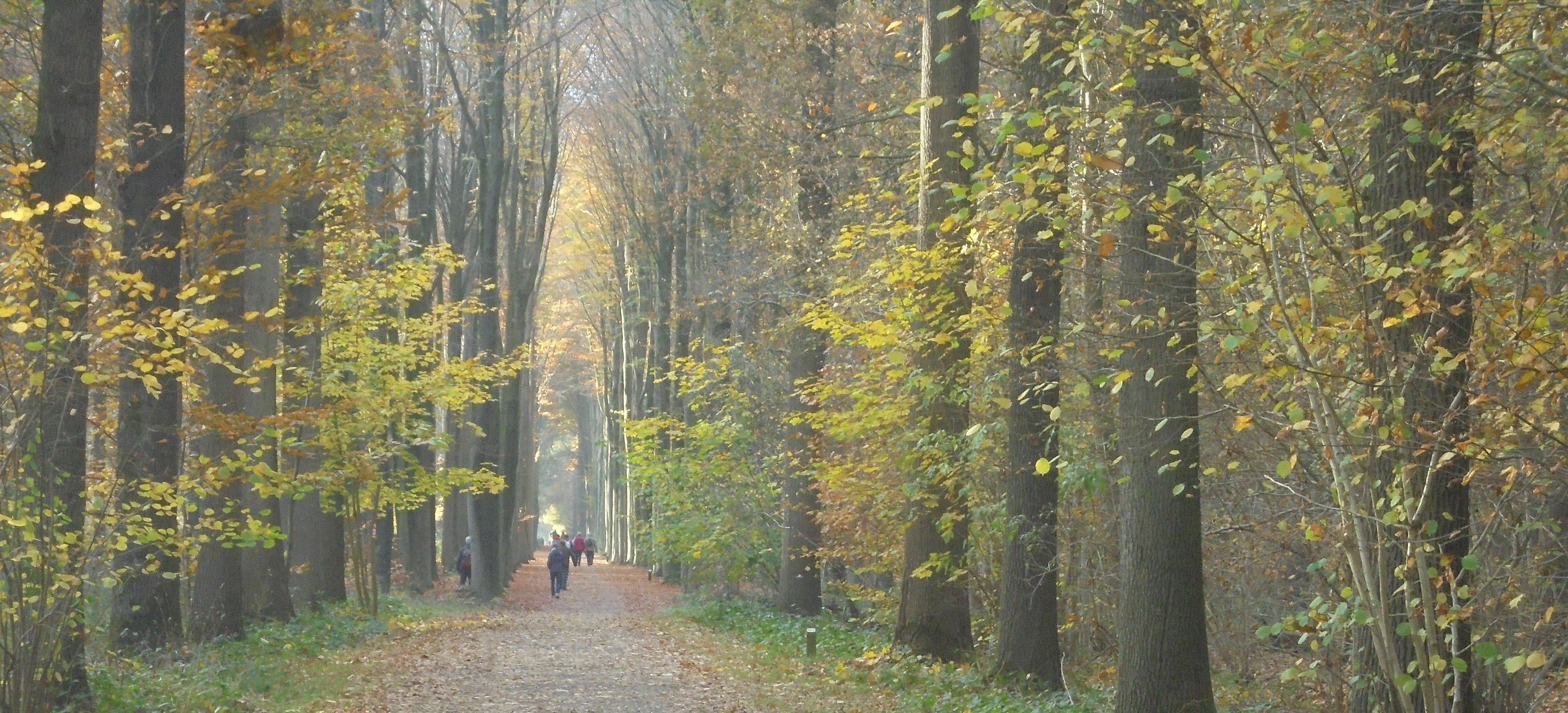 Lippensgoed-Bulskampveld - Beernem - West-Vlaanderen - België